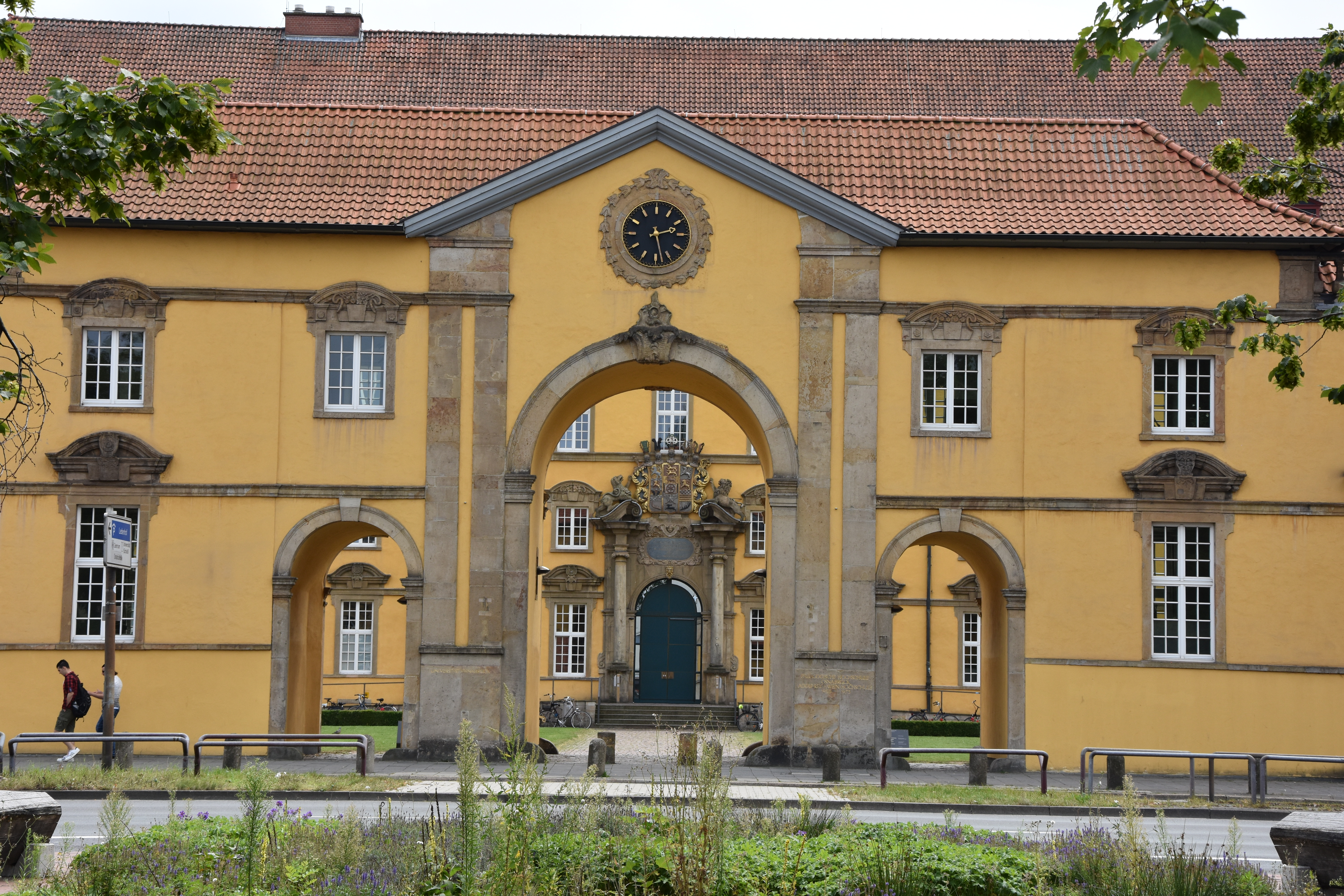 Torhaus Schloss Osnabrück